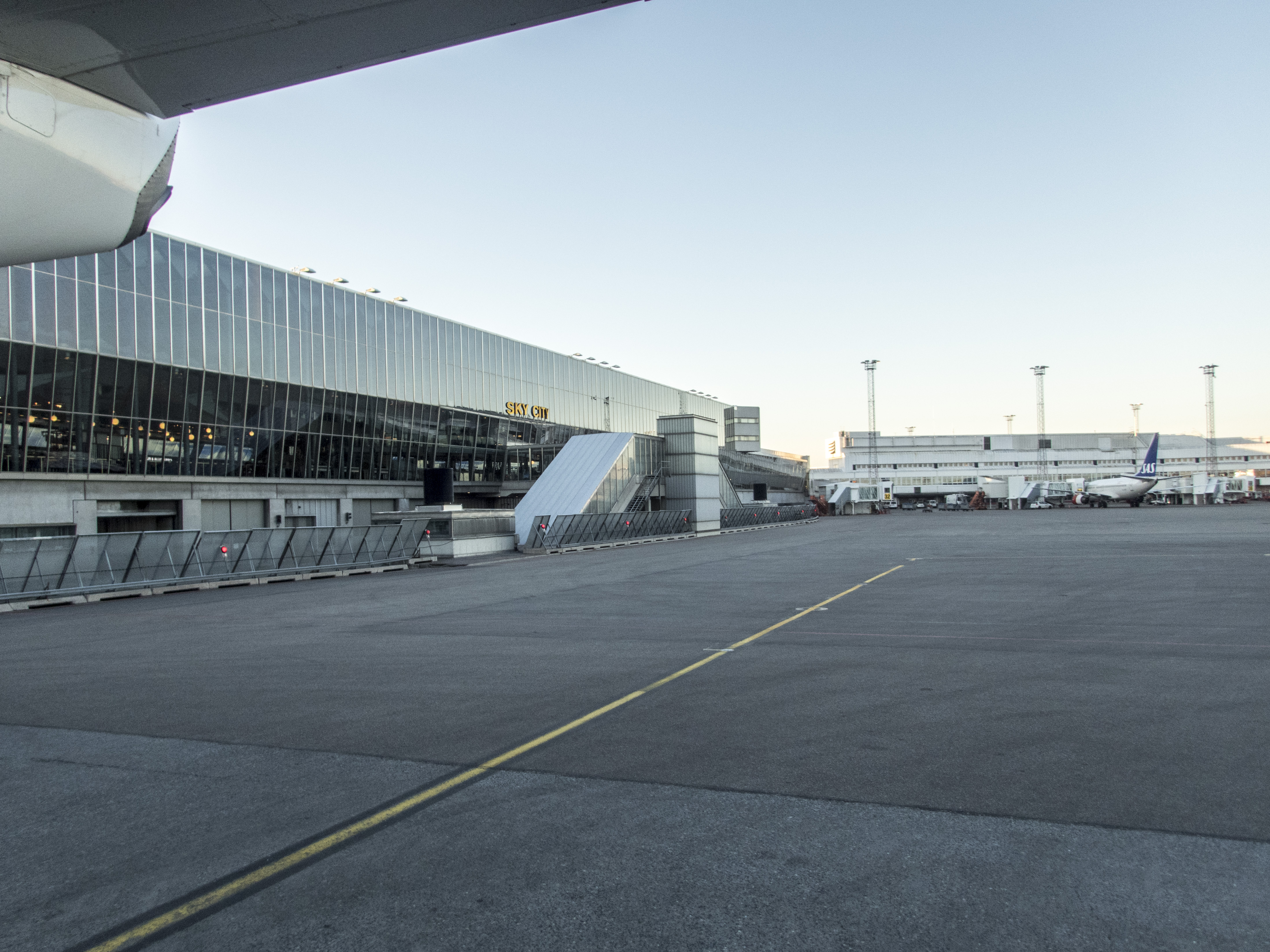 Arlanda, Sky city. Invigd 1993. Arkitekter Mierop & Belaieff Arkitektkontor